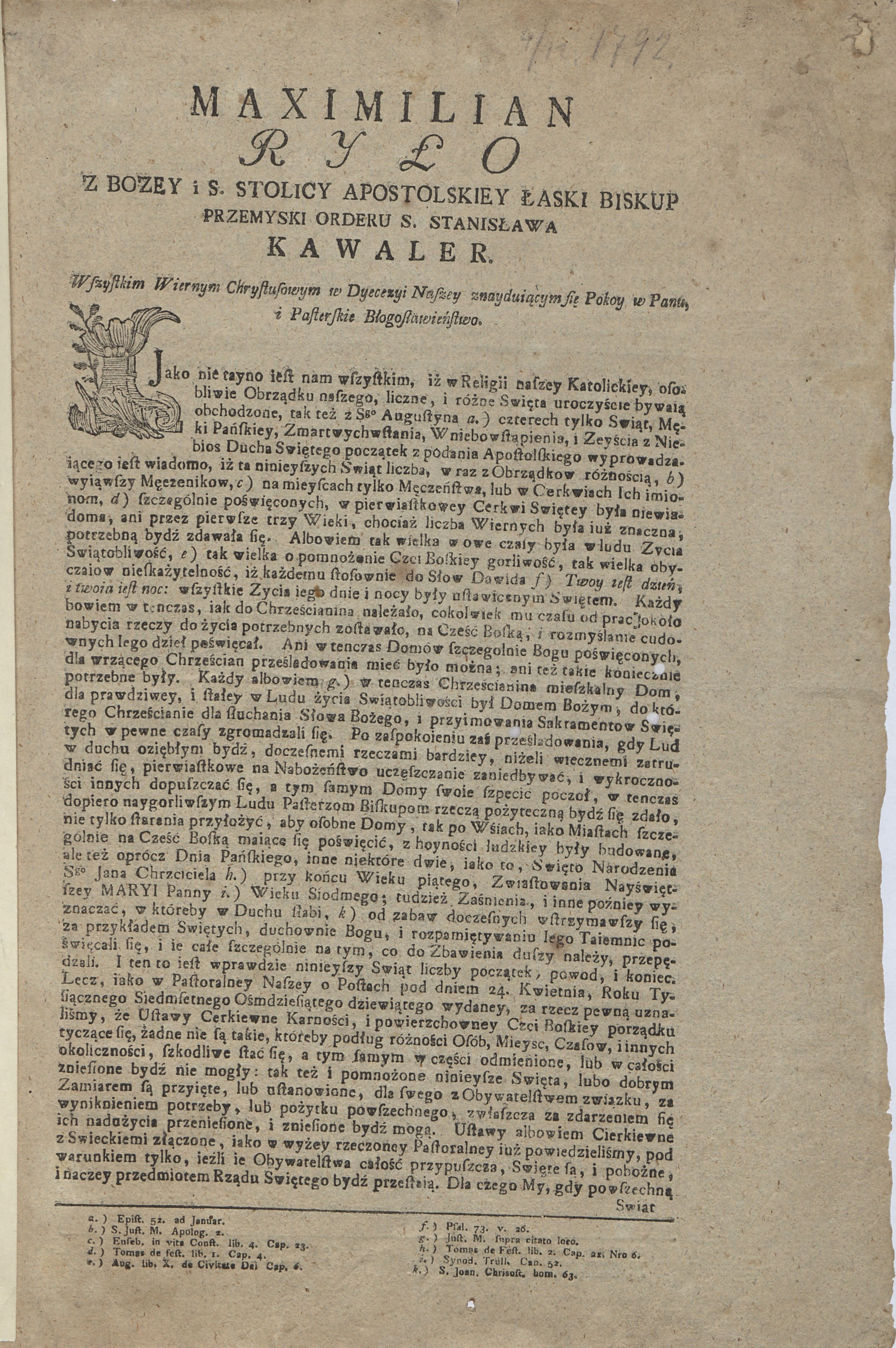 List pasterski Maksymiliana Ryłły, unickiego biskupa przemyskiego, z 1792 r.